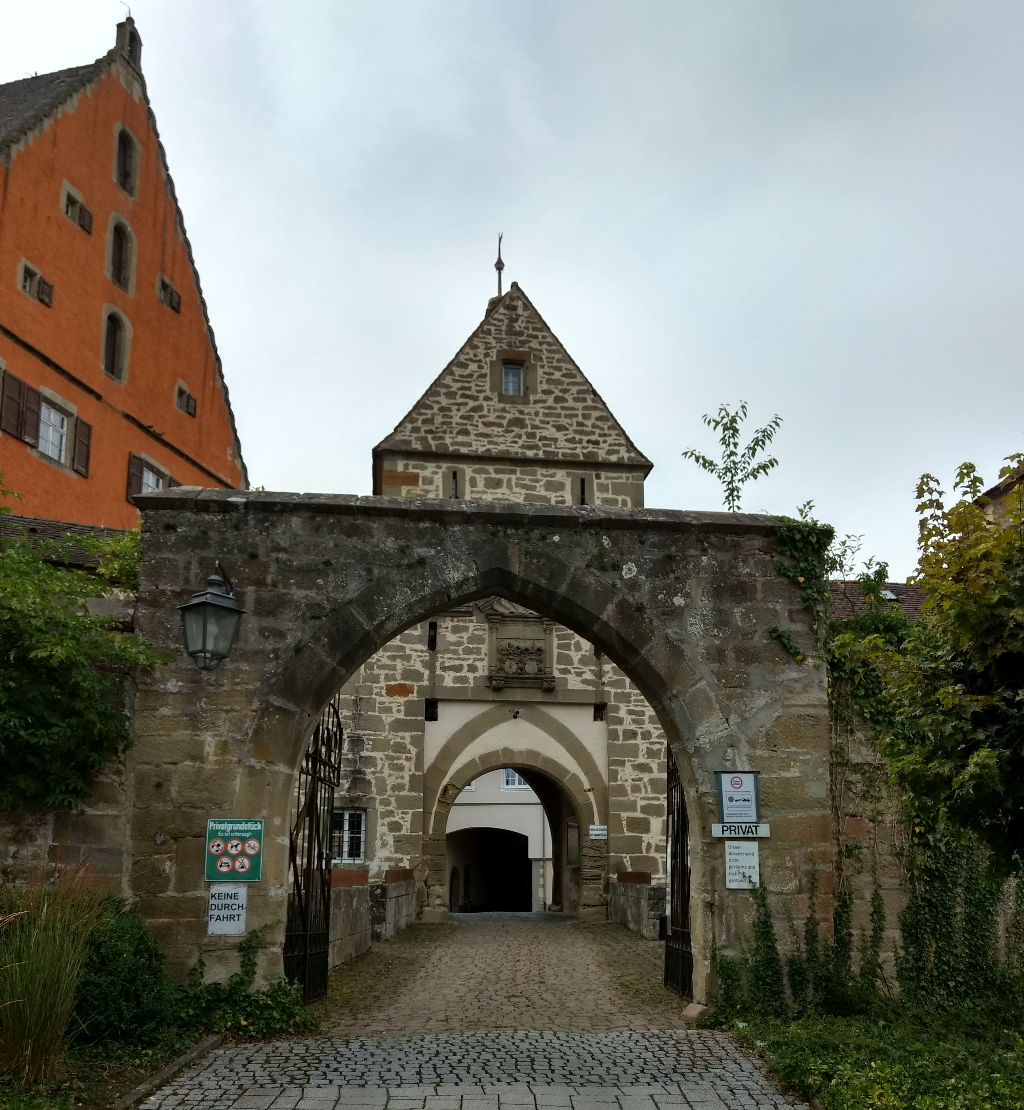 Eingang zum Schloss Obersontheim